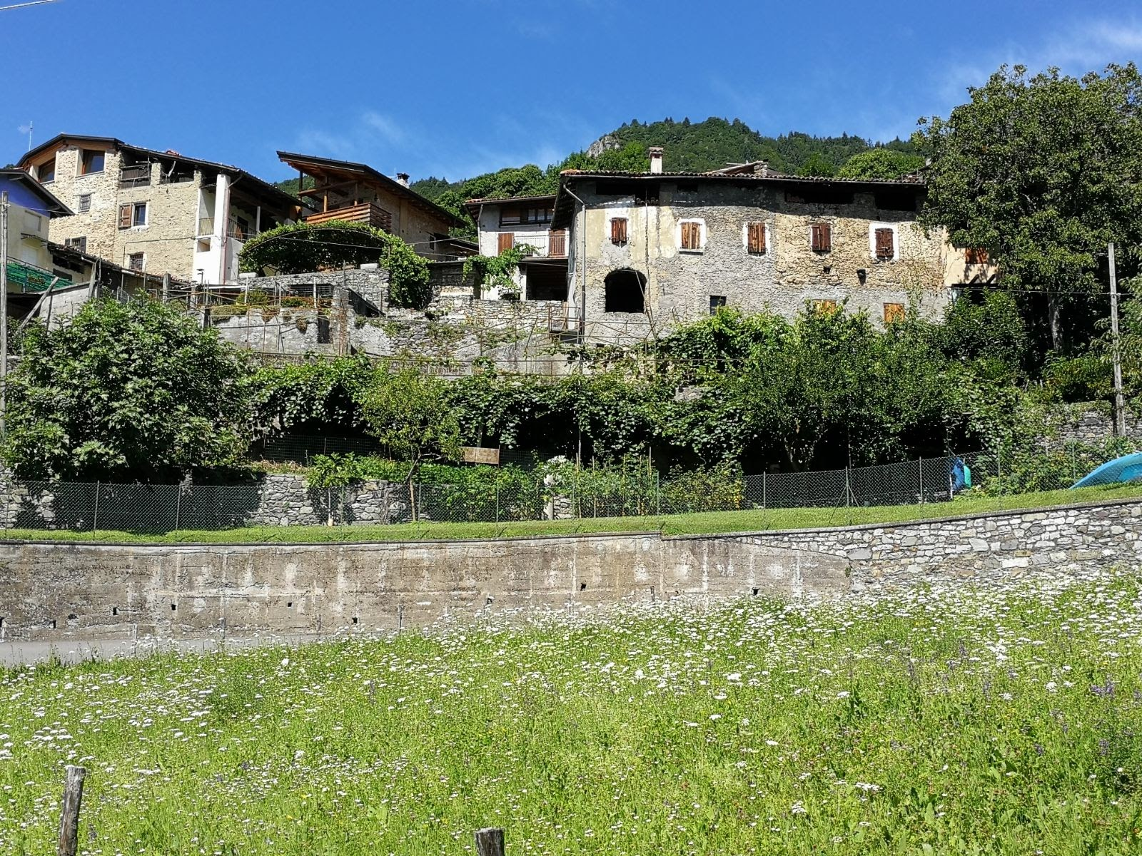 Panorama di Flaccanico